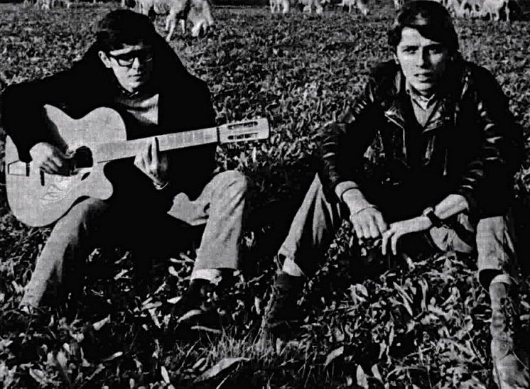 Italian musical duo Franco IV e Franco I